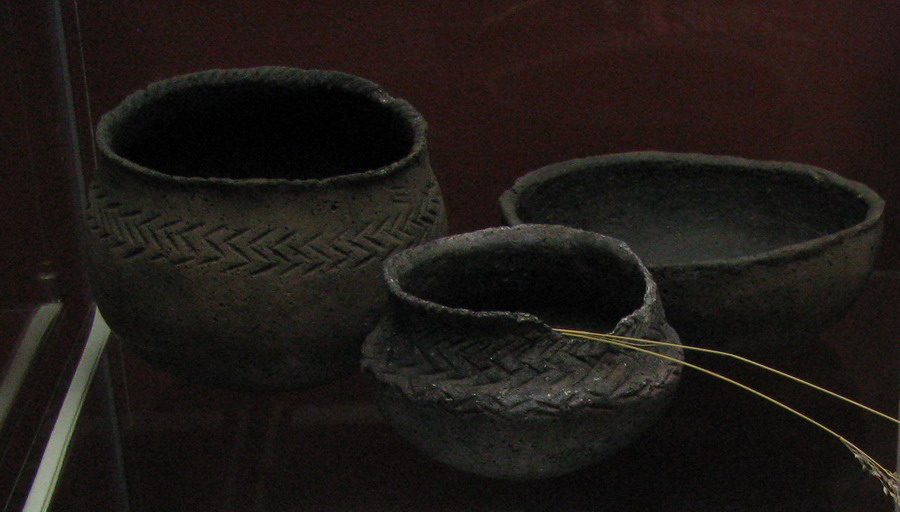 Сосуды петрогромского типа найдены при раскопках близ горы Петрогром (недалеко от станции Исеть), а также на Шарташских Каменных палатках. Относятся к концу I — началу II тыс. н.э. Для сосудов Петрогромского типа характерна высокая вертикальная или слегка наклонная наружу шейка, четко переходящая в округлое тулово. Способы орнаментации посуды неодинаковы. Первый — шнуровой, второй — местный, гребенчатый, среди узоров которого преобладают горизонтальный зигзаг, поясок из наклонных линий, наклонные столбики гребенчатых оттисков. Хранятся в Свердловском областном краеведческом музее.